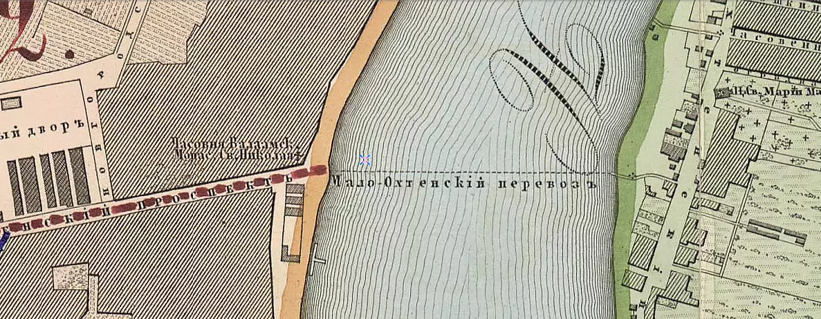 Мало-Охтенский перевоз